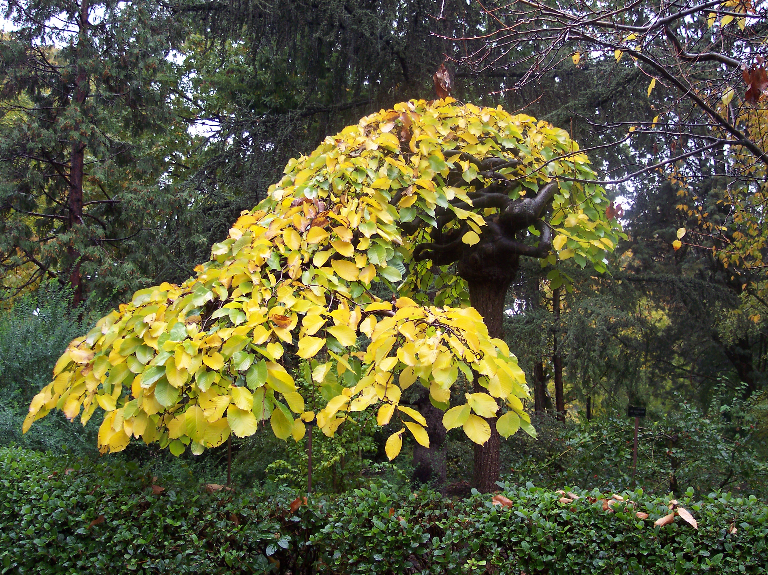 Ulmus glabra 'Pendula', follaje otoñal. Real Jardín Botánico de Madrid